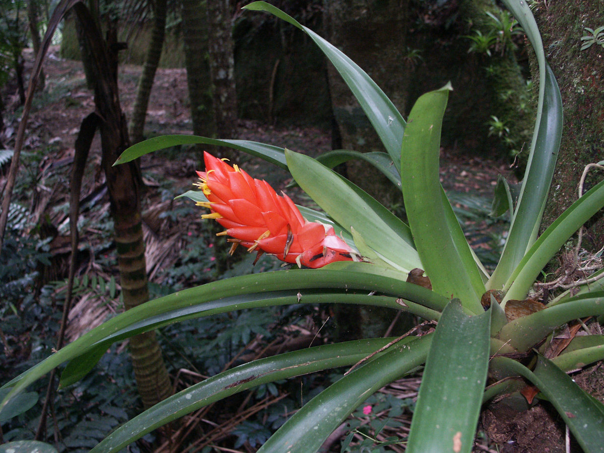 Toro Negro State Forest, Puerto Rico